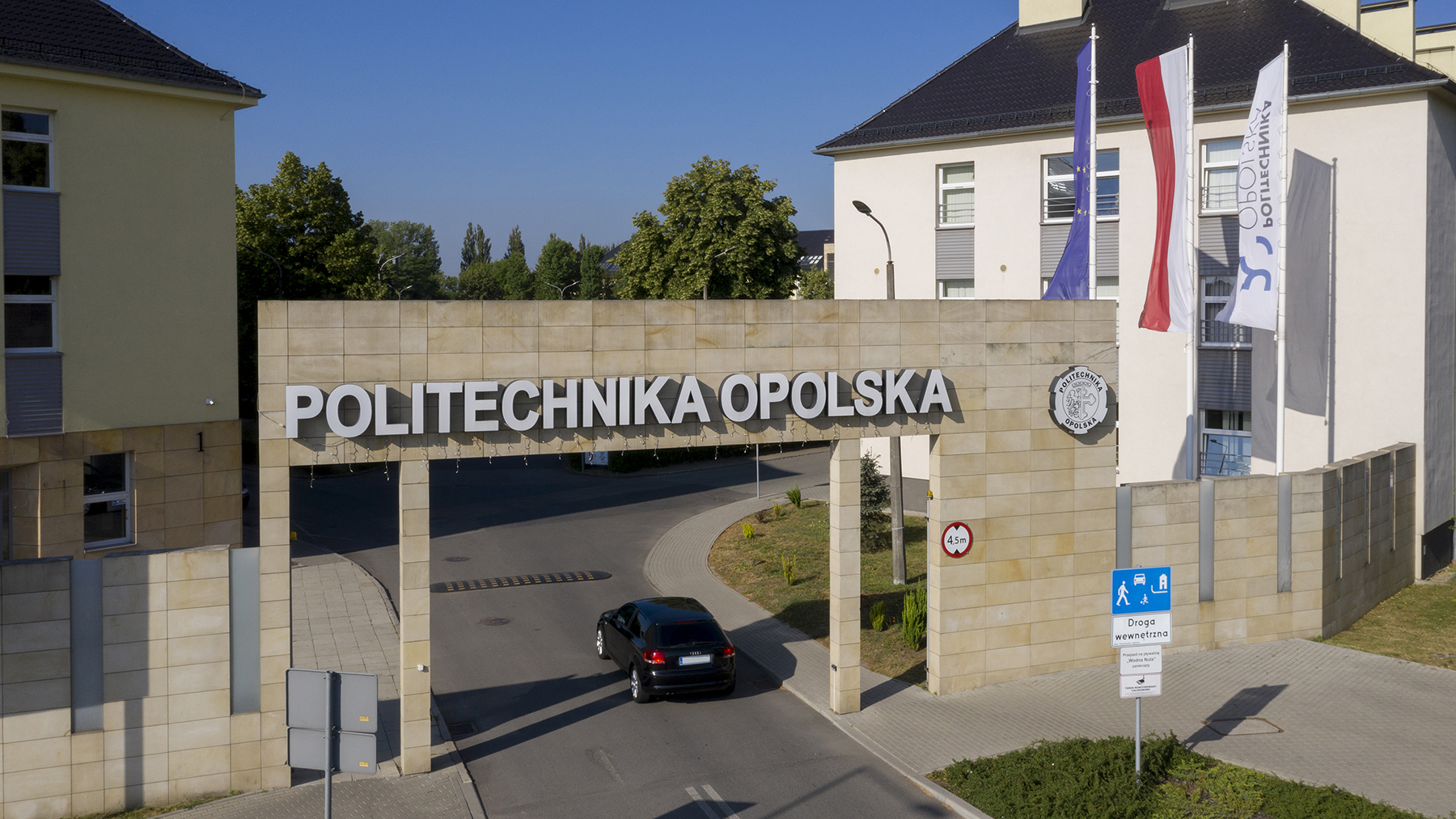 Brama wjazdowa II kampusu Politechniki Opolskiej